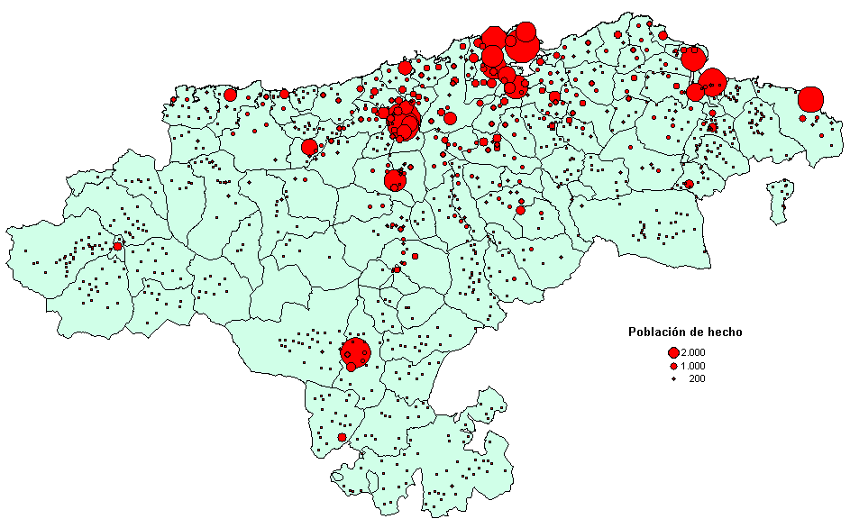 Mapa demográfico. Censo de población de 2001. categoría:Mapas de España (imagen)